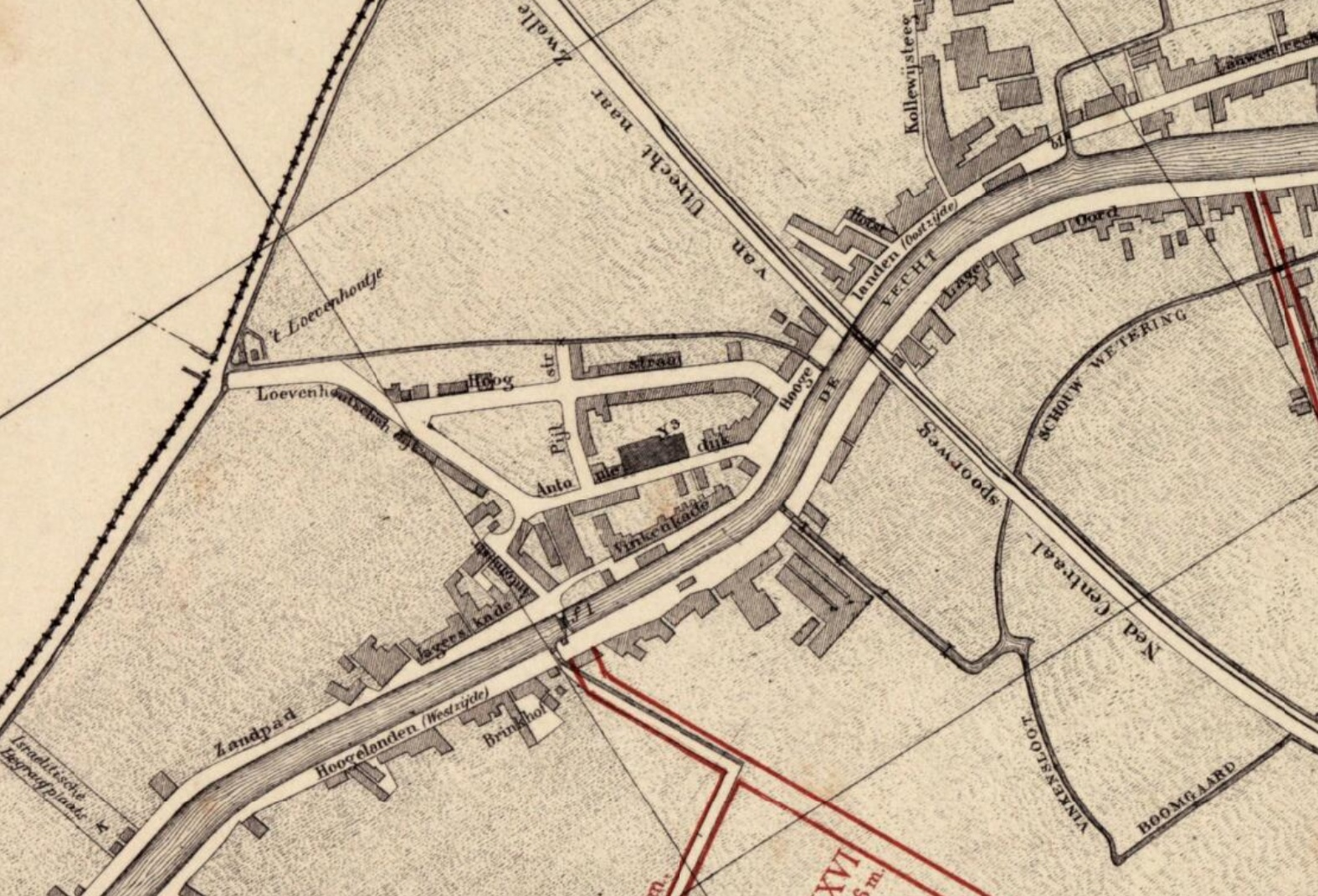 Uitsnede van Plattegrond van het uitbreidingsplan van de stad Utrecht; met weergave van het bestaande stratenplan, wegen, spoorwegen, watergangen, bebouwing en groenvoorzieningen; met weergave van het ontworpen plan van hoofdwegen.